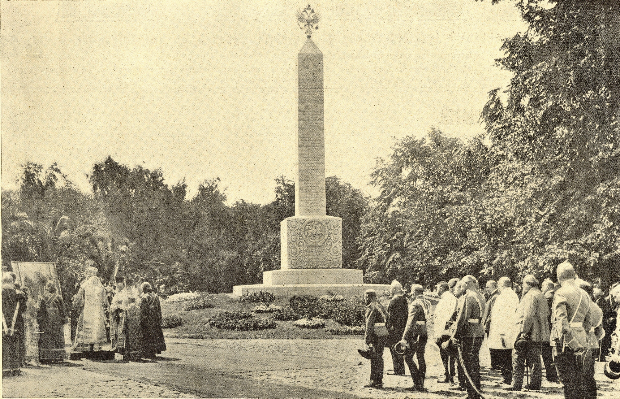 Фото 1914 г. Романовский обелиск - в честь 300-летия дома Романовых в Александровском саду (ск.Власьев С.А.).